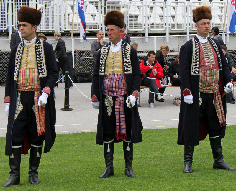 20 godina osnivanja Oružanih snaga Republike Hrvatske, Dana OS RH i Dana HKoV-a.